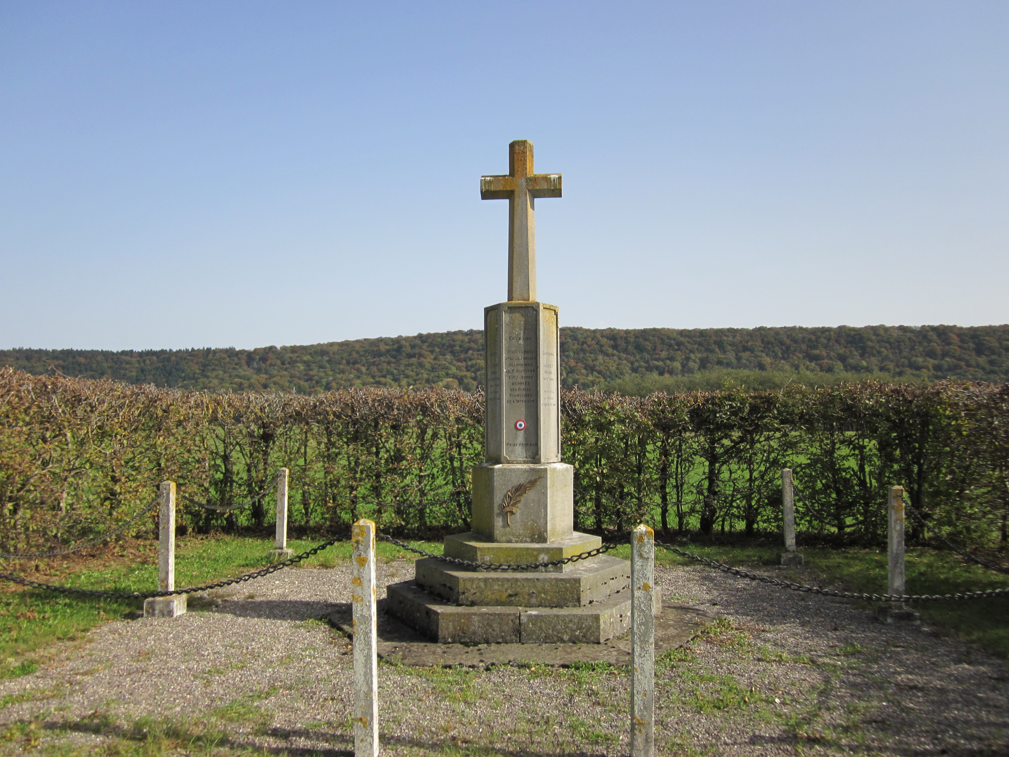 Besain_(39) -_stèle_fusillés_3_août_1944 Stèle commémorative de Besain : 5 hommes des Forces Françaises de l'Intérieur ont été fusillés par l'armée allemande à quelques centaines de mètres du village le 3 août 1944 Auguet Michel (capitaine), né à Saïda, mort pour la France à 33 ans Deroussin Henri (soldat), né à Pierre de-Bresse (Saône-et-Loire), mort pour la France à 19 ans Giraudo Georges (sergent), né à Chamblanc (Côte d'or), mort pour la France à 21 ans Guéraud Louis (sergent), né à Longwy-sur-le-Doubs (Jura), mort pour la France à 26 ans Perrin André (soldat), né à Bondy (Seine), mort pour la France à 18 ans